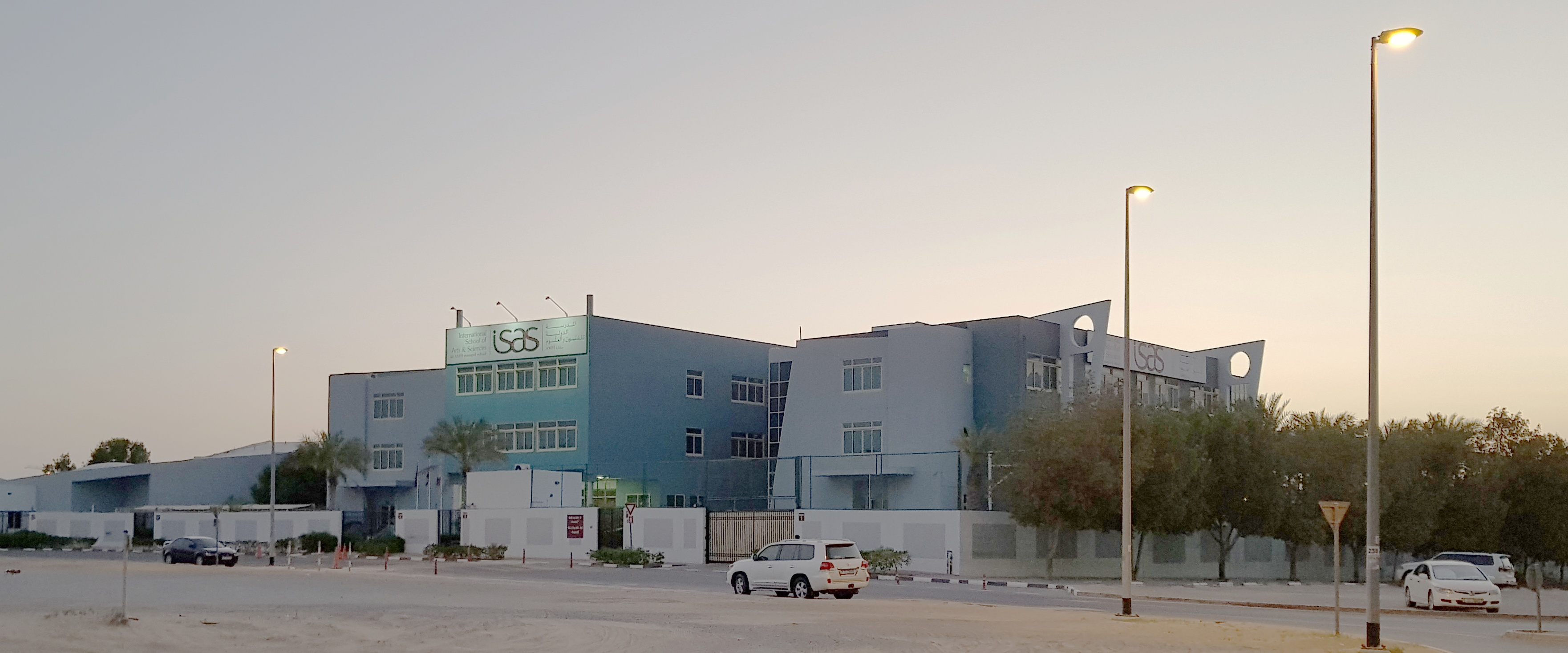 ISAS, Al Warqa, Dubai